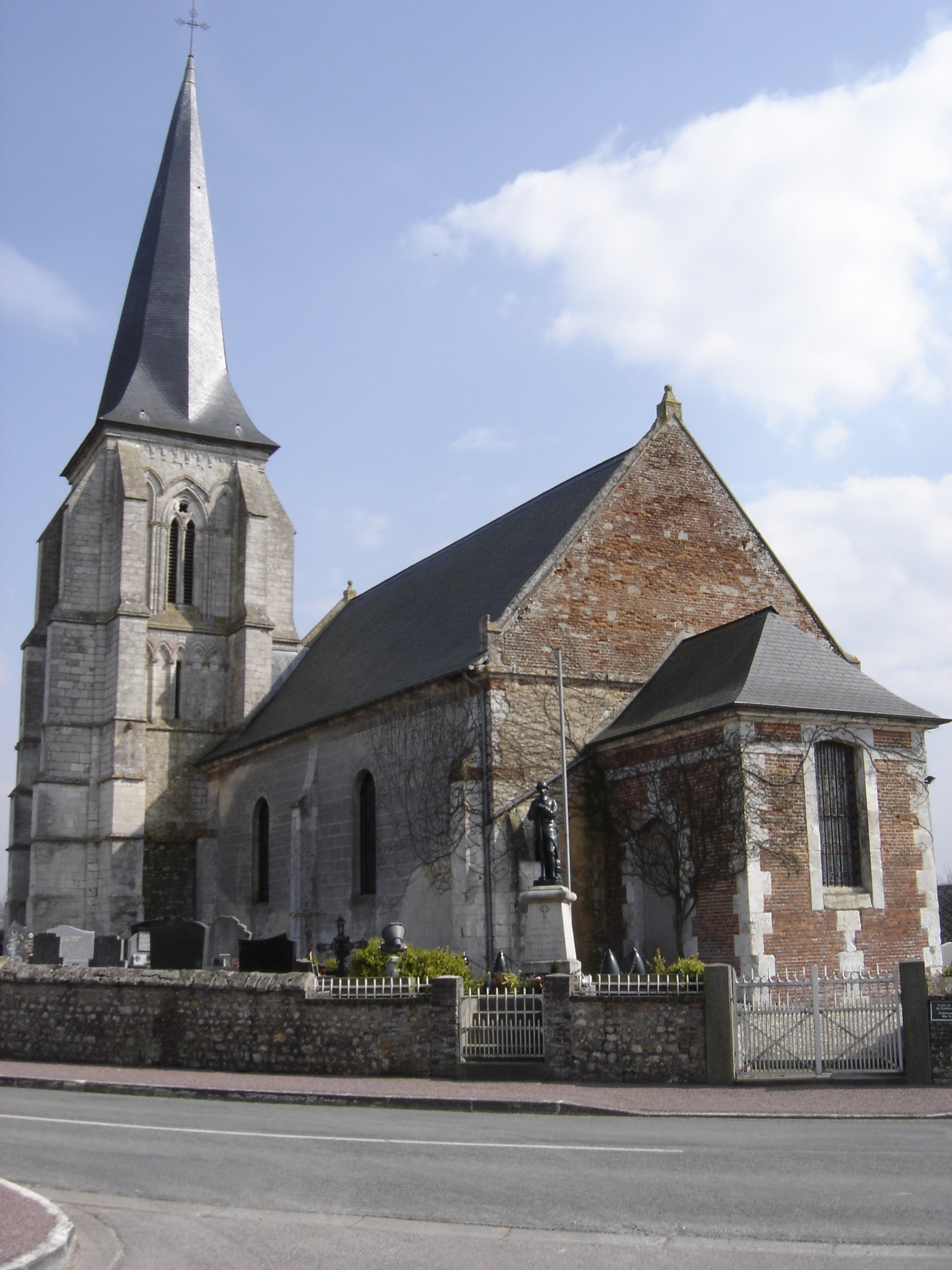 Eglise de Fourmetot - Eure - France